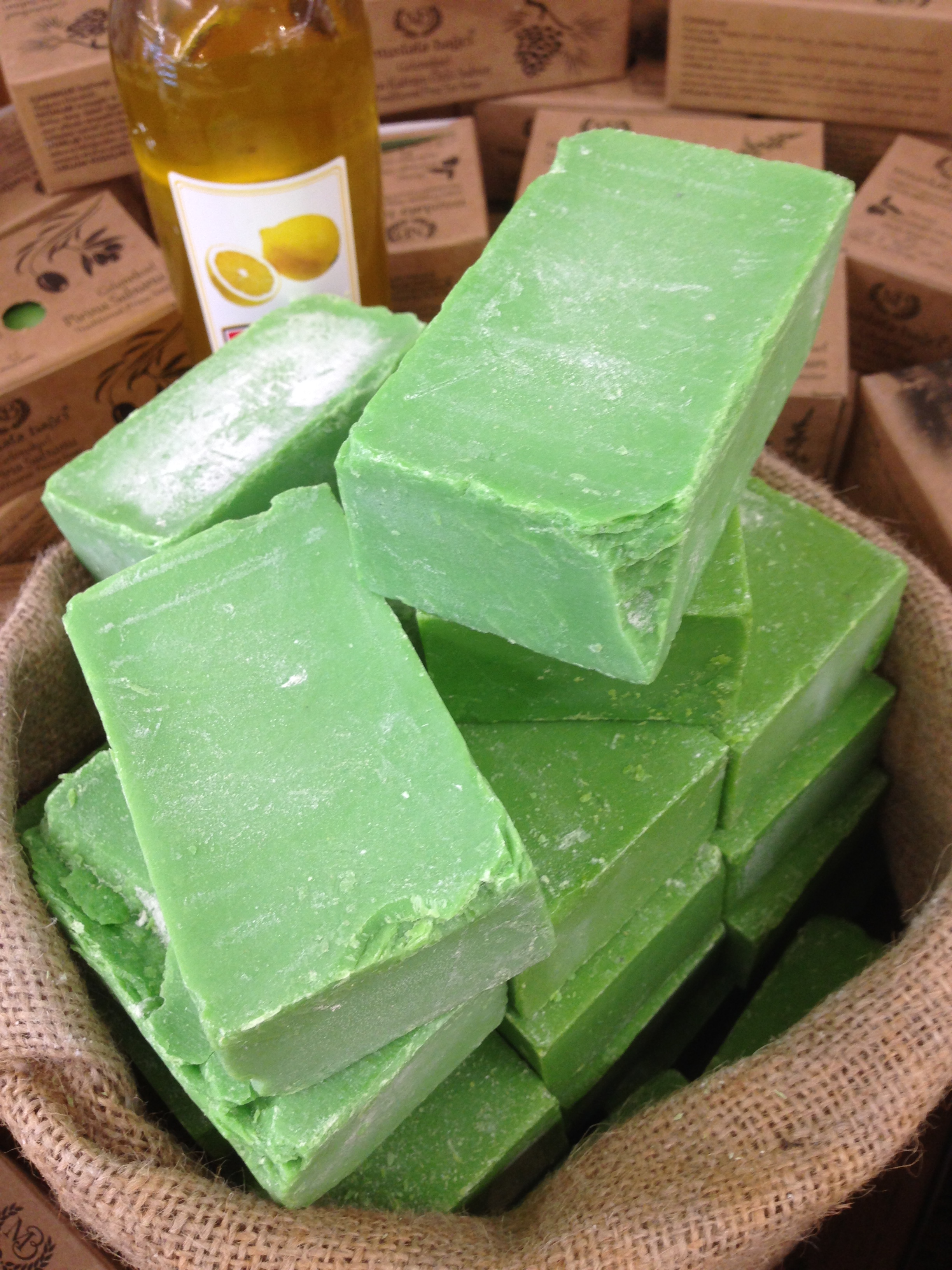 çeşitli renkte ve içerikte sabunlar